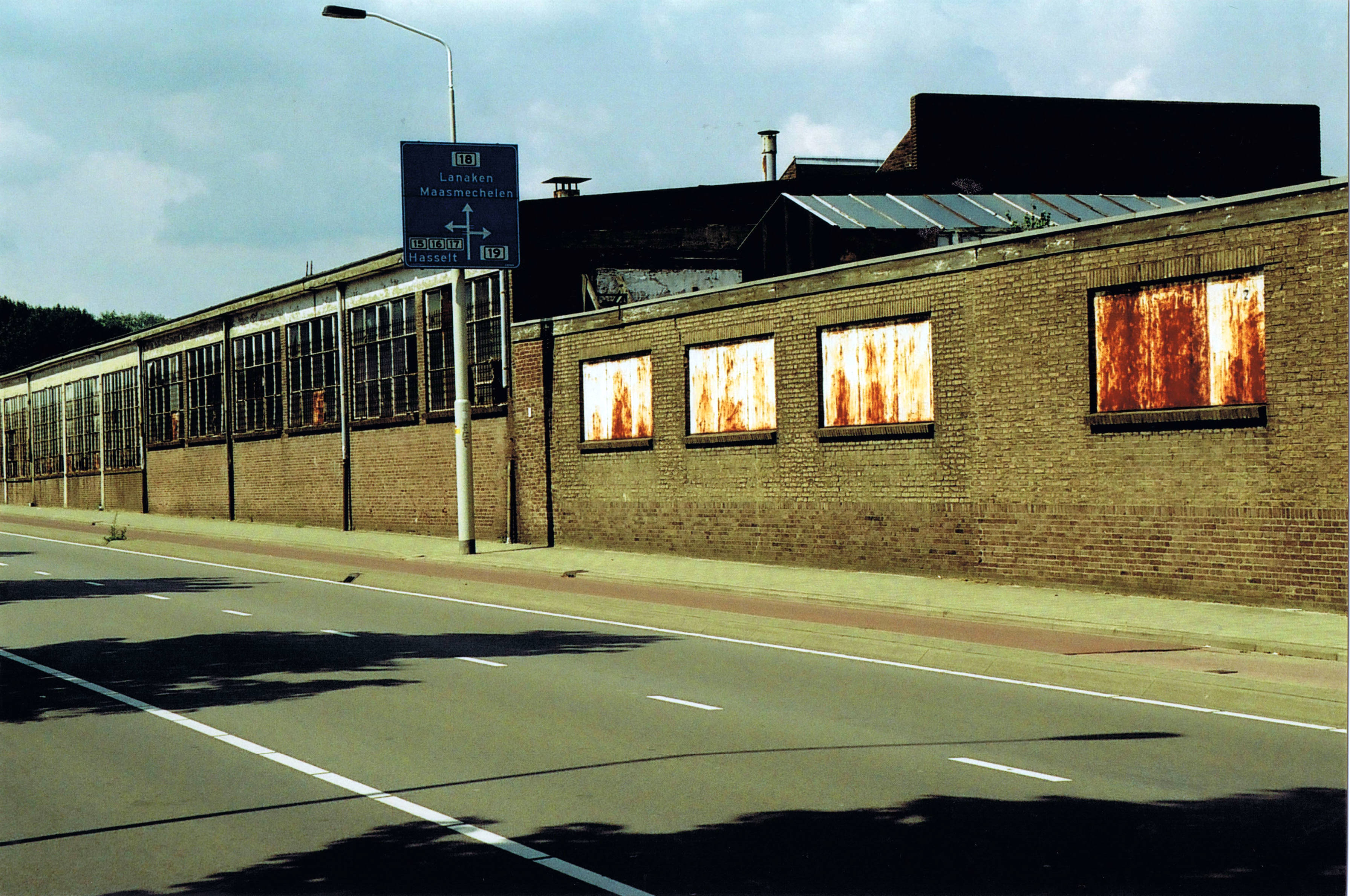 Maastricht 2007 20 Radium Fabriek